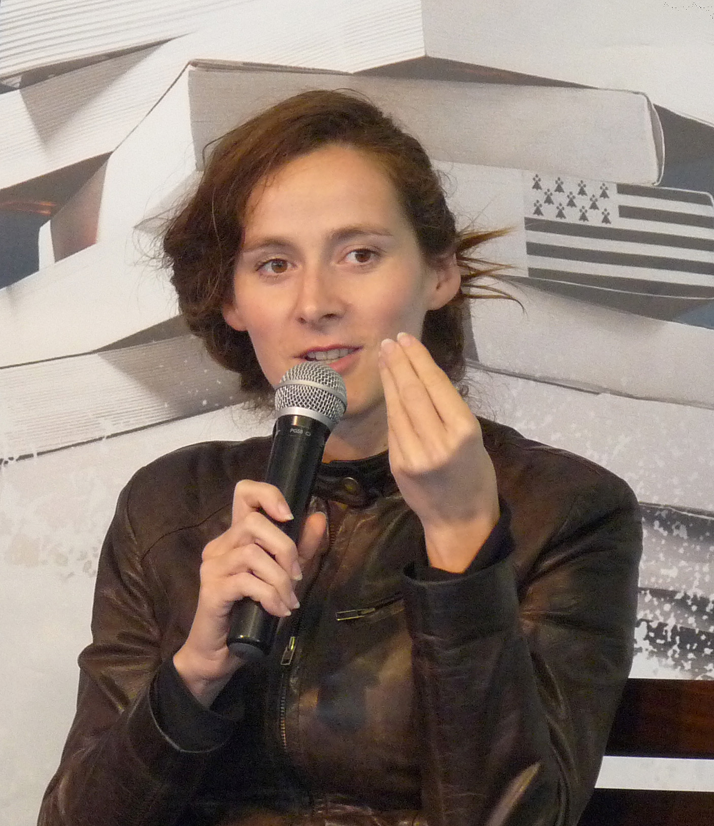 Emilie de Turckheim au Salon du livre en Bretagne (Vannes, Morbihan)